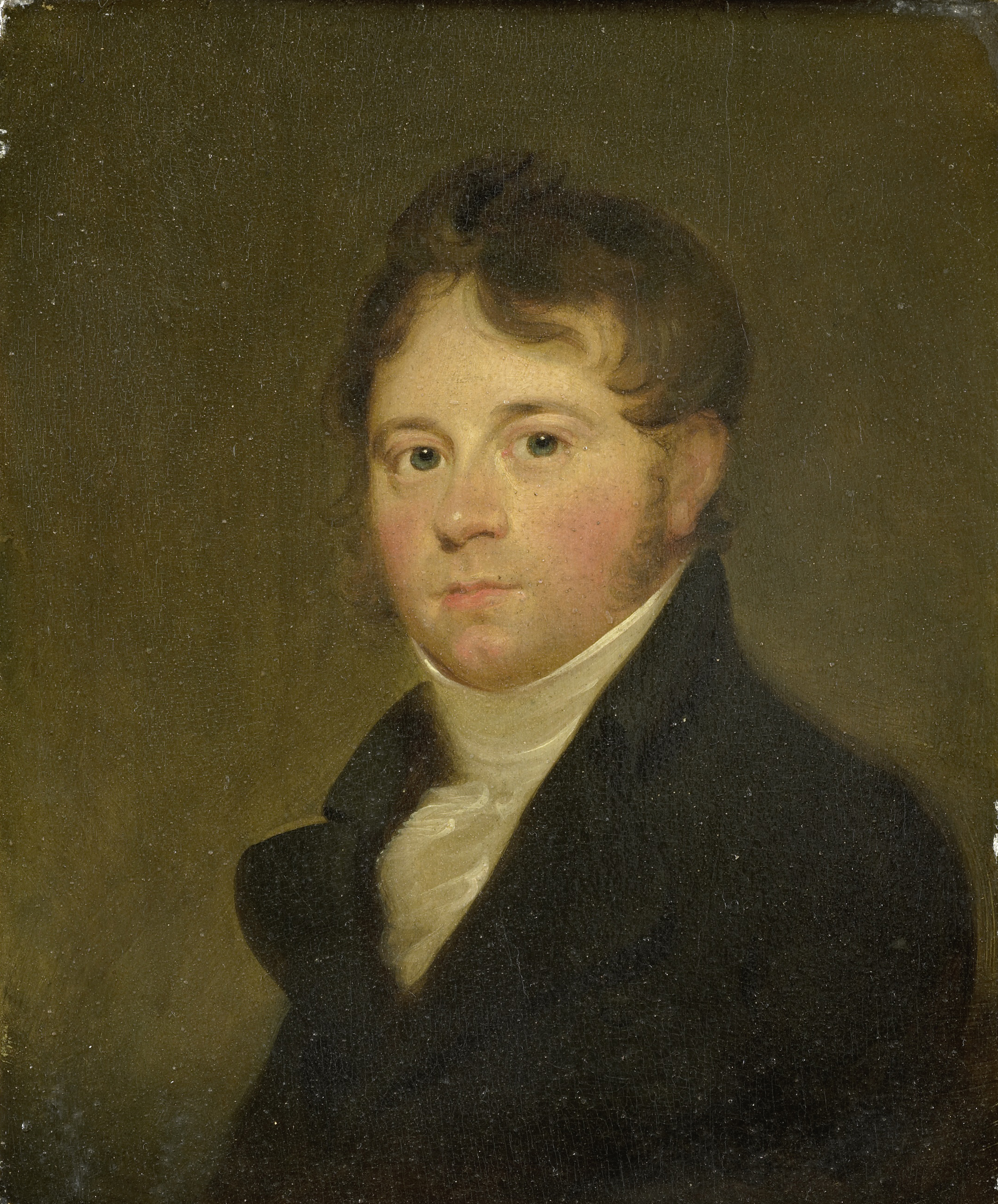 Portret van Laurens de Witte van Citters (1781-1862). Vader van Jonkheer J. de Witte van Citters, erflater van een reeks familieportretten aan het Rijksmuseum. Buste naar links.